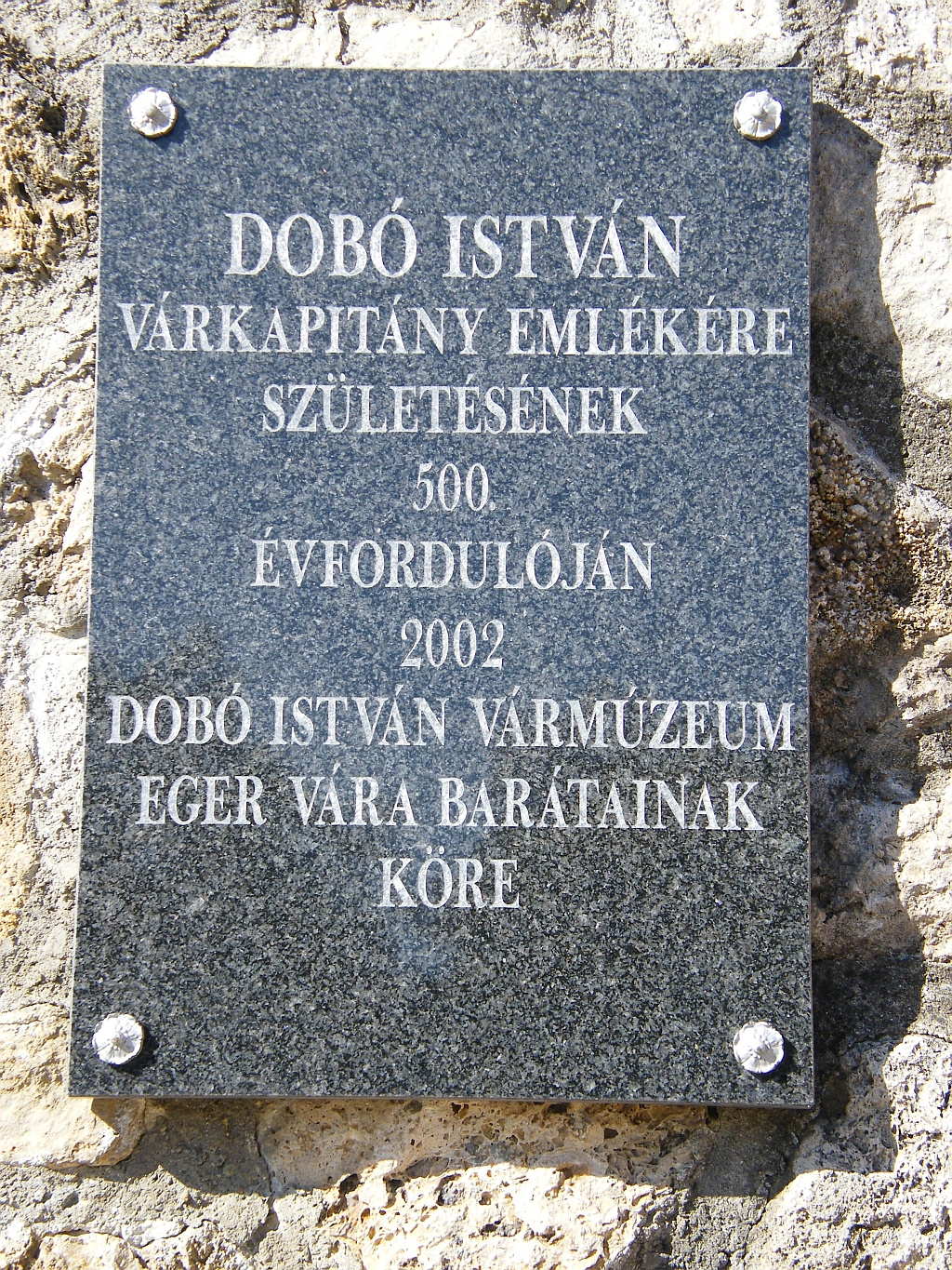 Erődrendszer romjai (Eger, Szervita utca, Dobó István utca, Bástya utca, Vécsey Sándor utca) This is a photo of a monument in Hungary, Identifier: 17237